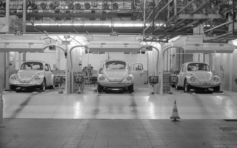 VW-Werk, Wolfsburg Einfahren und Inspektionsabnahme in den Fahrzeug-Prüfständen